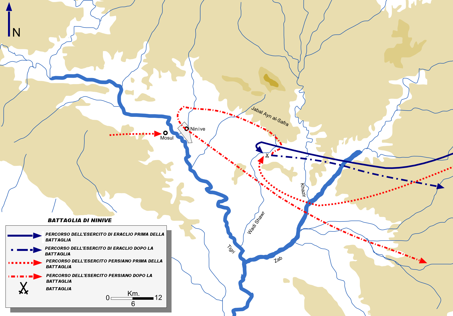 mappa che mostra le manovre degli eserciti bizantino e persiano prima e dopo la battaglia di Ninive.